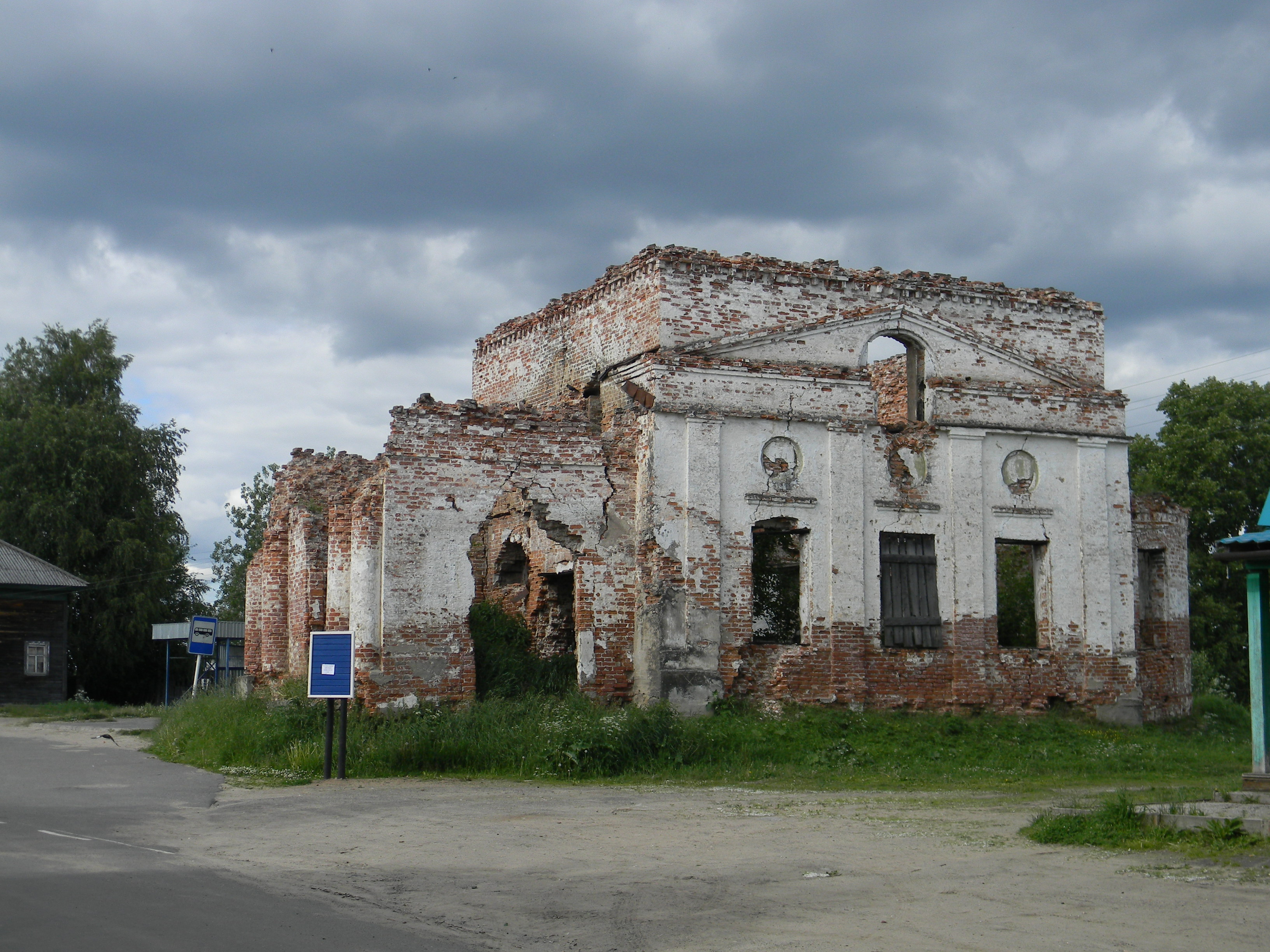 Покровская церковь: Порог, Онежский район, Архангельская область